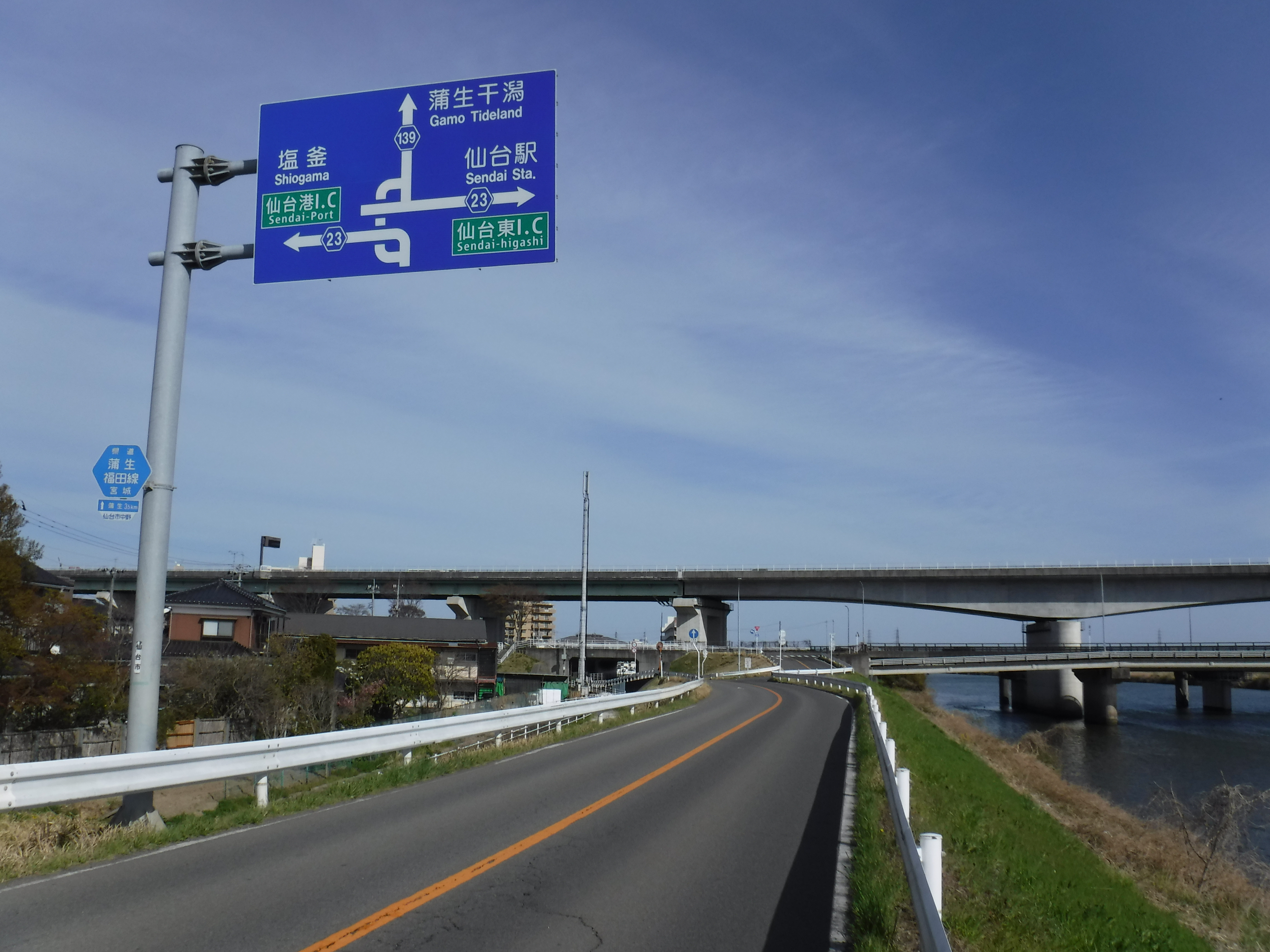 宮城県道139号線仙台市宮城野区高砂二丁目付近（蒲生方面を撮影）